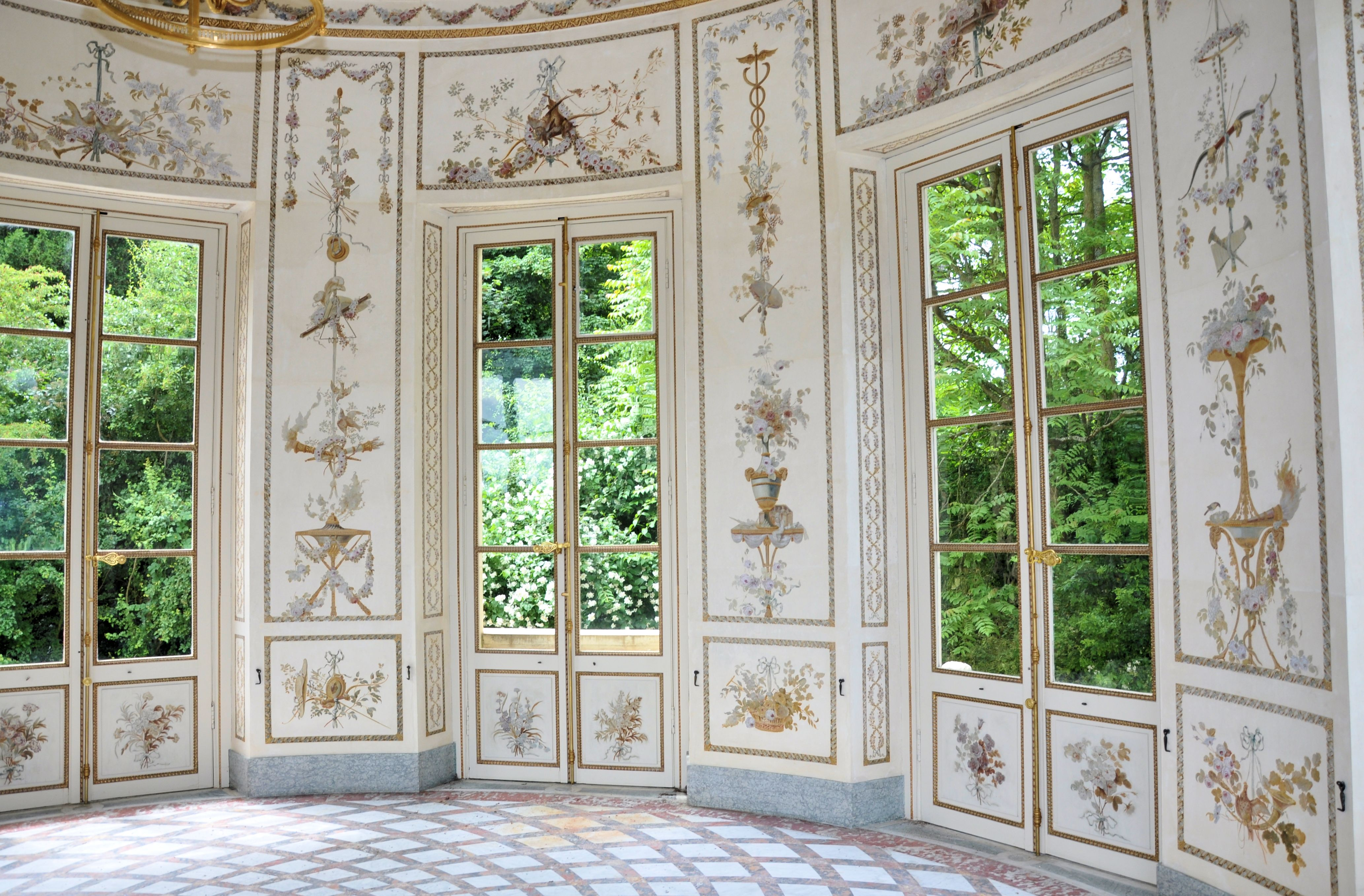 Belvédère du Petit Trianon - Salon intérieur